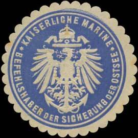 Sealing stamp Title: Kaiserliche Marine, Befehlshaber der Sicherung der Ostsee Description: blau, weiß, geprägt Place: size: 4 cm